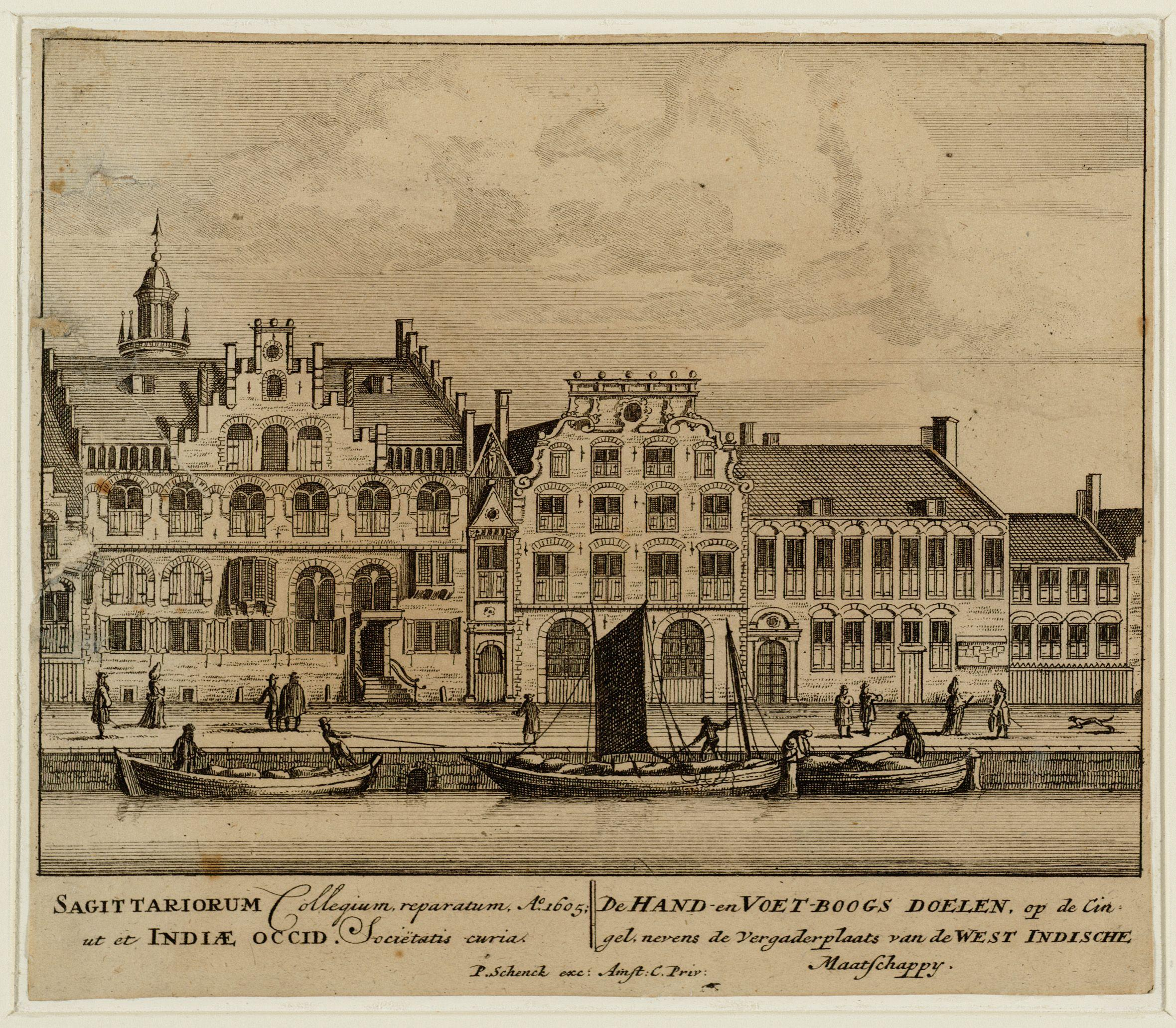 Beschrijving De Hand- en Voets-Boogs Doelen, op de Cingel, nevens de vergaderplaats van de West Indische Maatschappij Singel 421-425 met de Hand- en Voetboogsdoelen. Techniek: ets. Documenttype prent Vervaardiger Schenk, Pieter (1660-1713) Collectie Collectie Stadsarchief Amsterdam: tekeningen en prenten Datering 1710 Geografische naam Singel Inventarissen Afbeeldingsbestand 010097003419